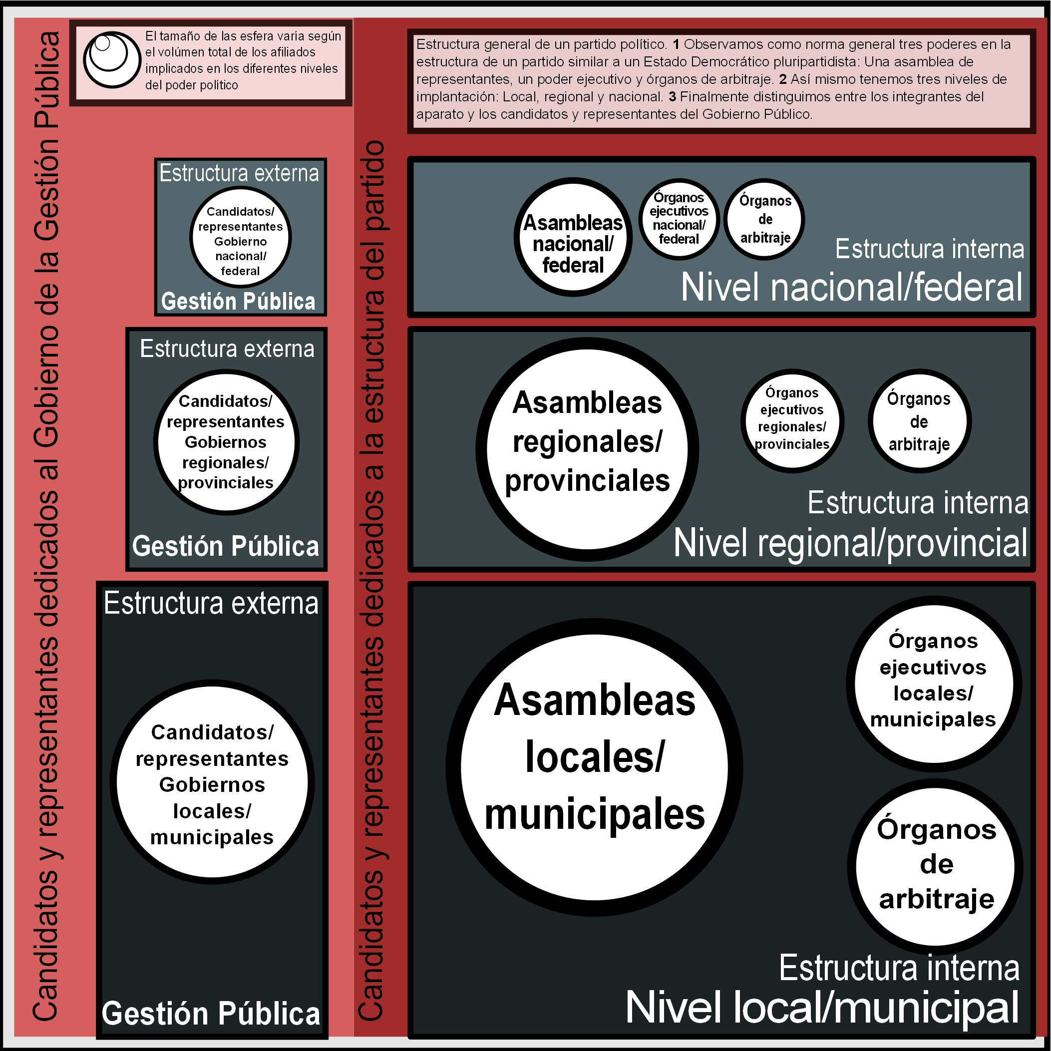 Estructura general de un partido político en los sistemas democráticos pluripartidistas.